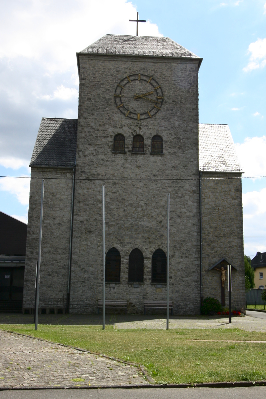 Kirche Maria Geburt, Elgendorf, Ortsteil von Montabaur, Westerwald, Rheinland-Pfalz, Deutschland